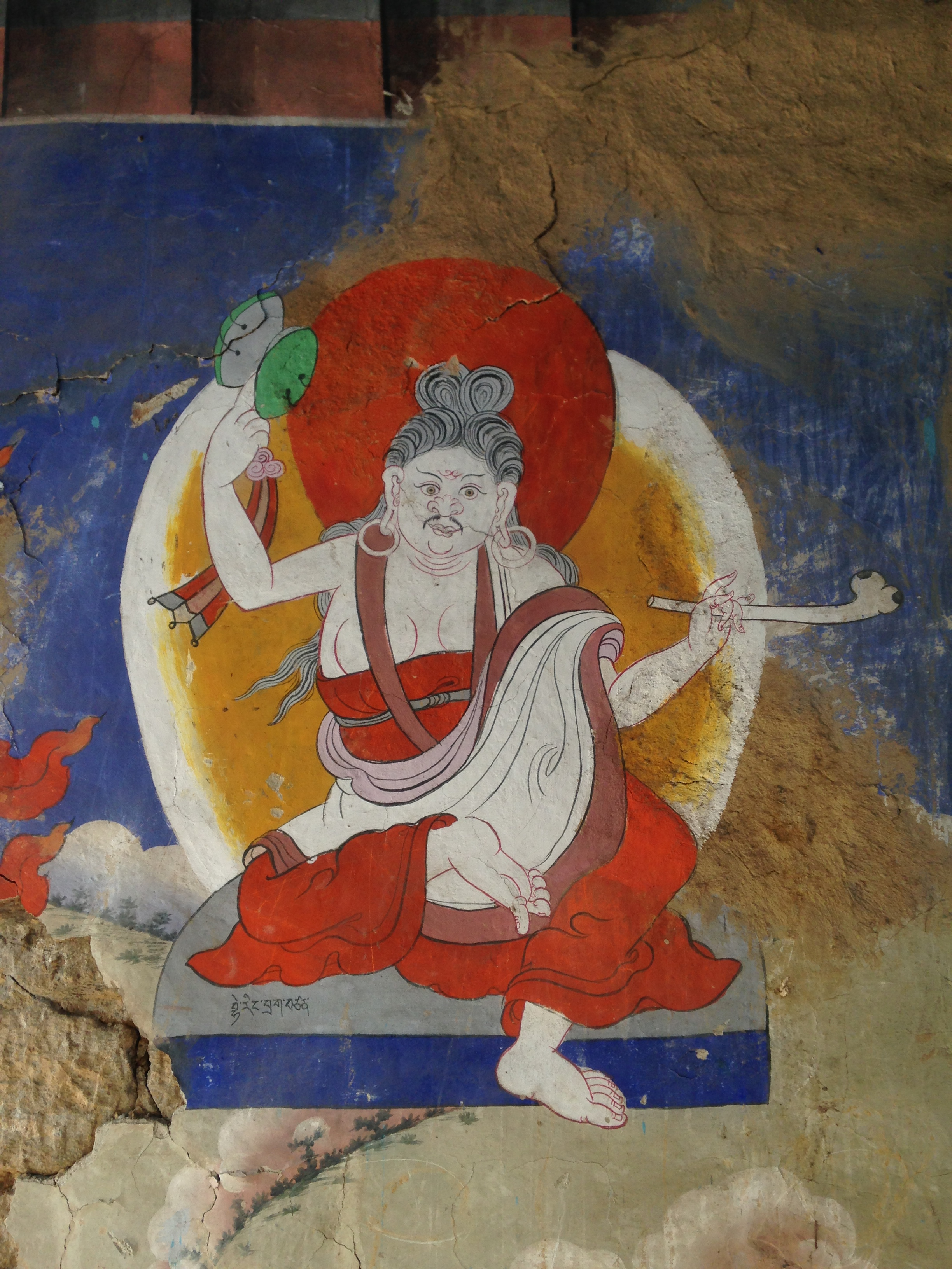 Détail avant destruction d'une peinture murale unique au monastère de Ringhim